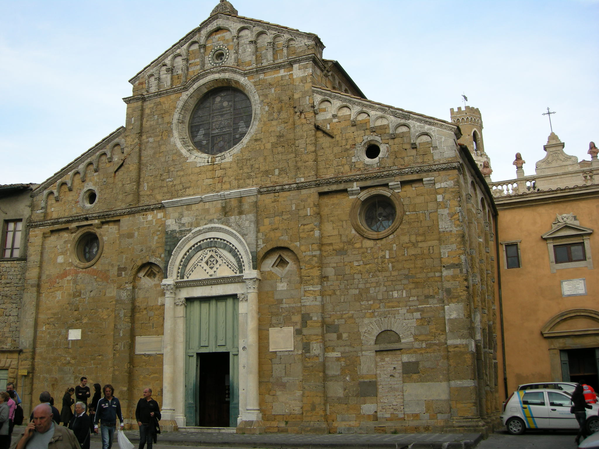 Duomo di volterra, esterno